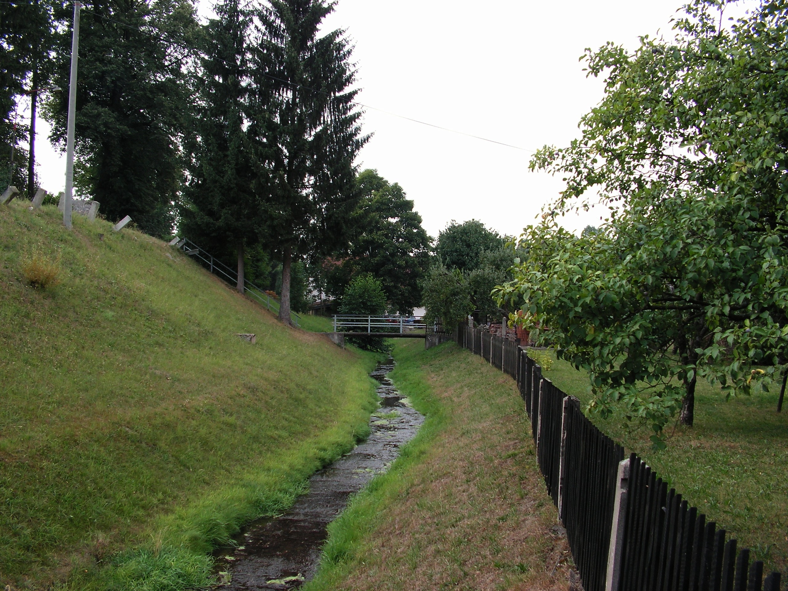 Sloupnický potok v Dolní Sloupnici v okrese Svitavy